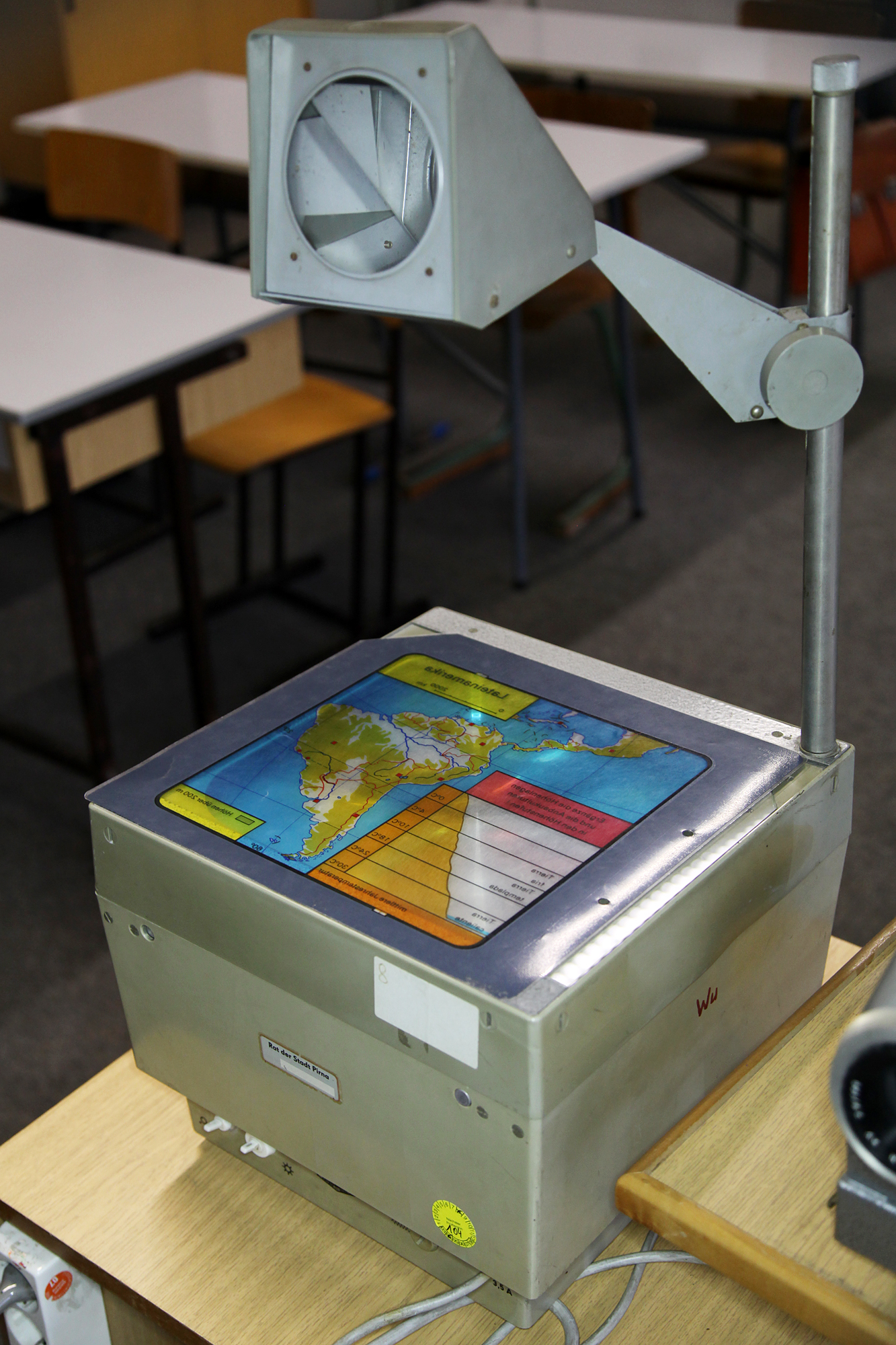 Polylux / Overheadprojector im DDR-Museum Pirna